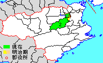 徳島県名西郡の範囲